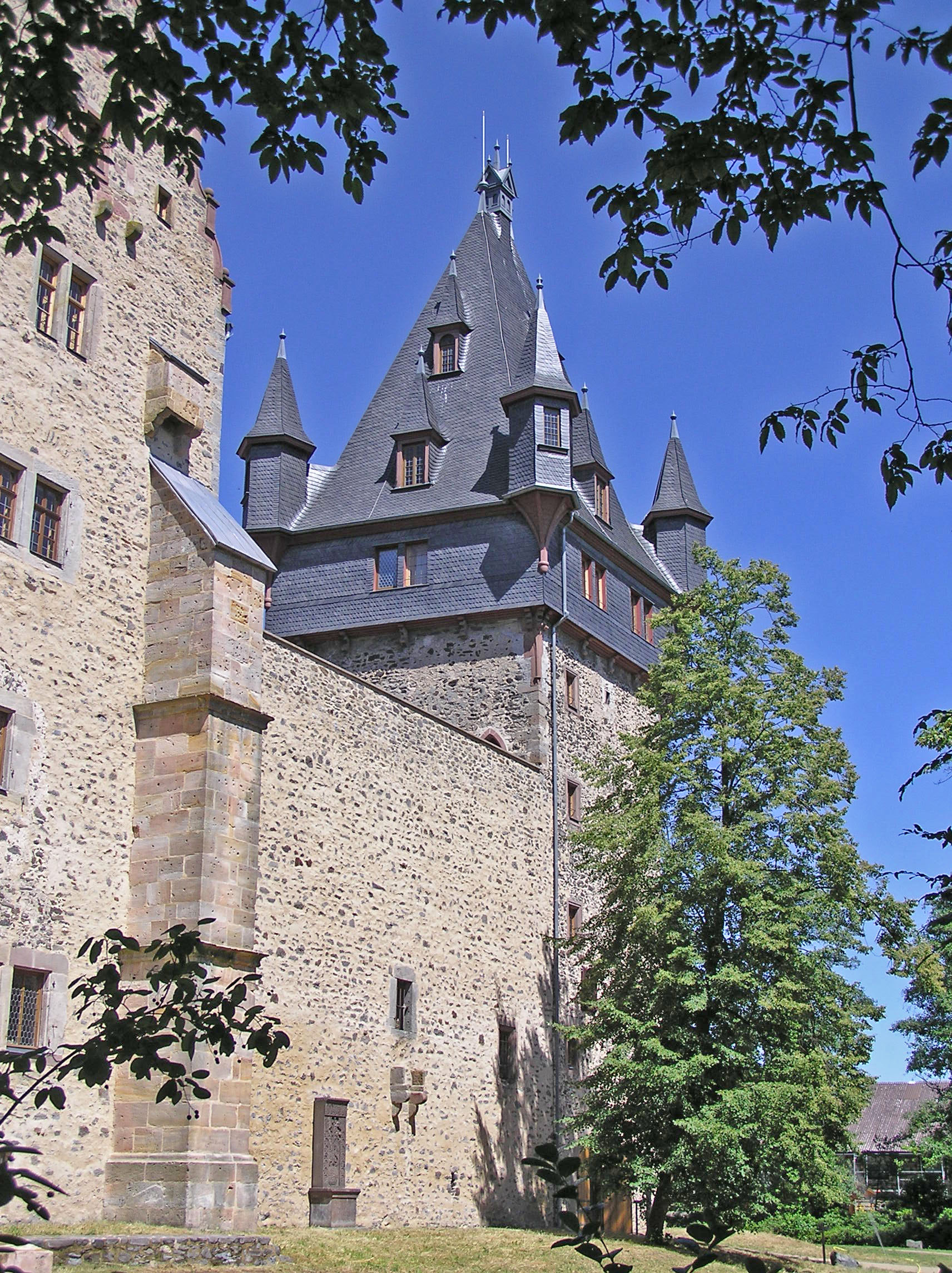 Schloss Romrod